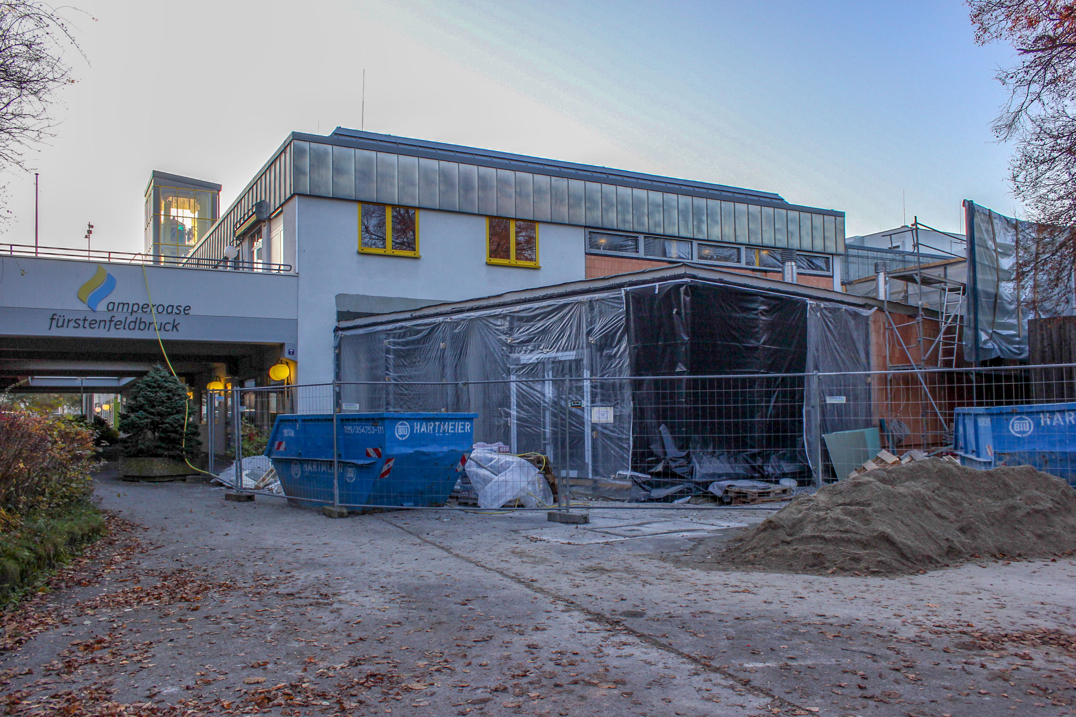 Das Foto zeigt die Außenansicht des Kassenbereichs während des Umbaus im November 2018.